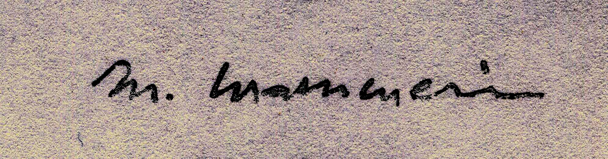 Signature du romancier et anthropologue algérien Mouloud Mammeri. Scan d'après livre dédidicacé